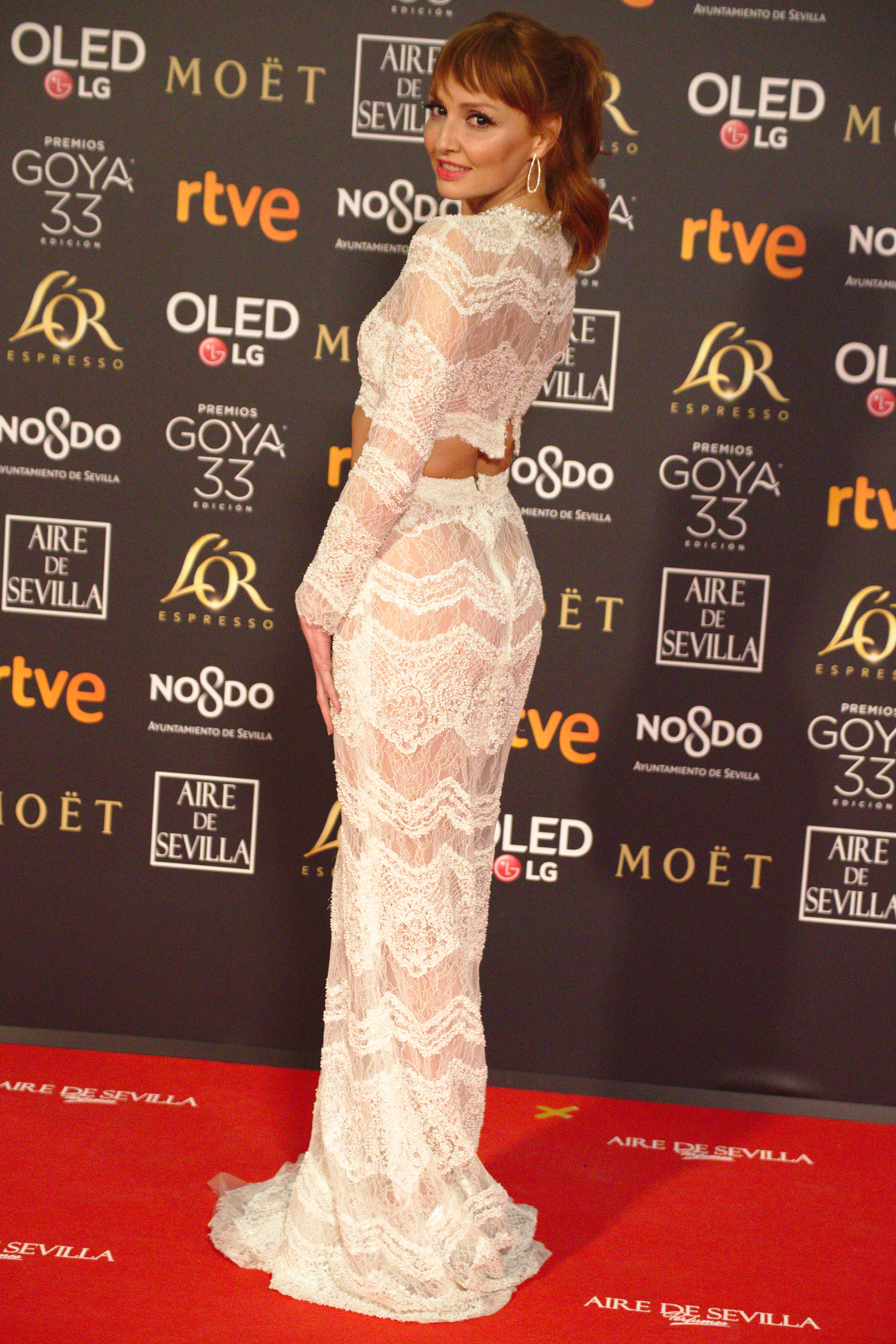 Cristina Castaño en la alfombra roja de los Premios Goya celebrados en Sevilla en Febrero 2019